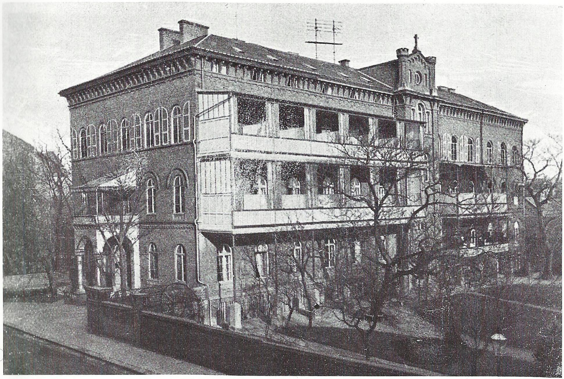 Friedrich-Wilhelms-Stift (erbaut 1852–1854), Bonner Talweg/Loestraße, Bonn: Gartenfront